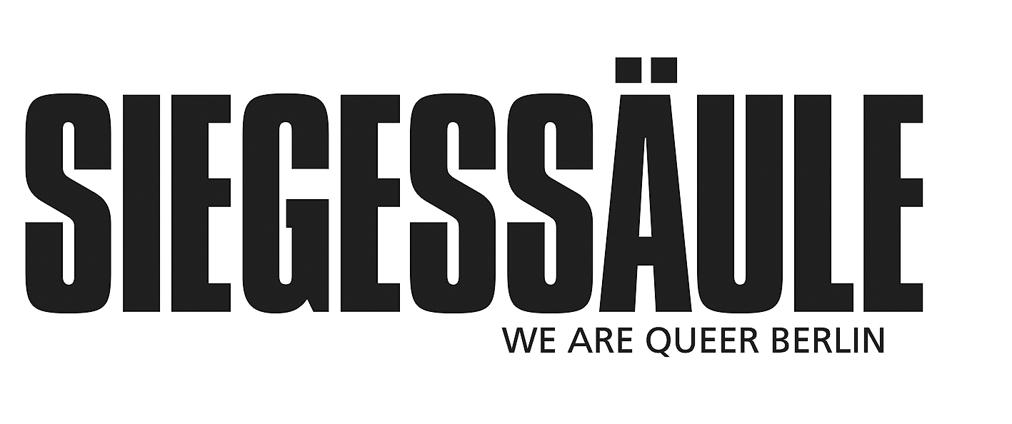 Logo Siegessaeule (Zeitschrift)